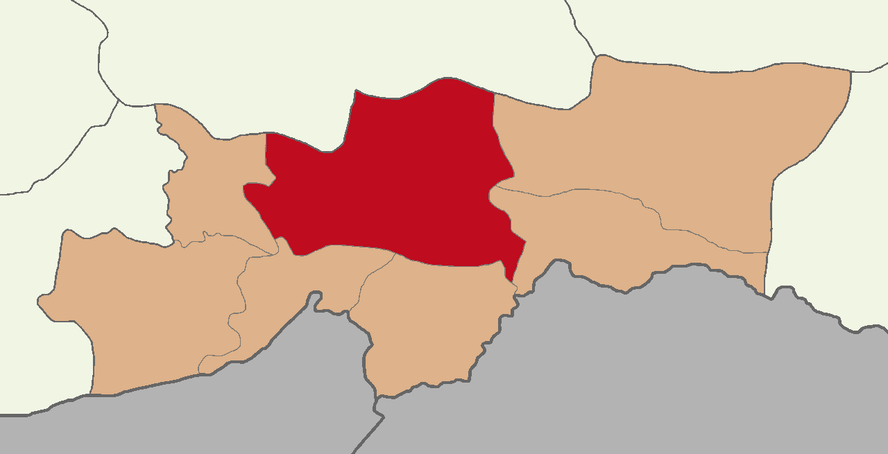 Şırnak Merkez ilçesinin konumu